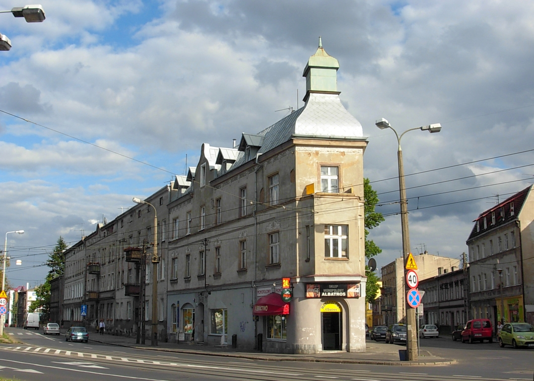 Ulica Nakielska w Bydgoszczy - skrzyżowanie z ul. Dolina